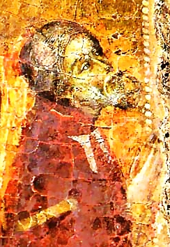 Probable retrato de Don Juan Manuel. Retablo Virgen de la leche de la catedral de Murcia.